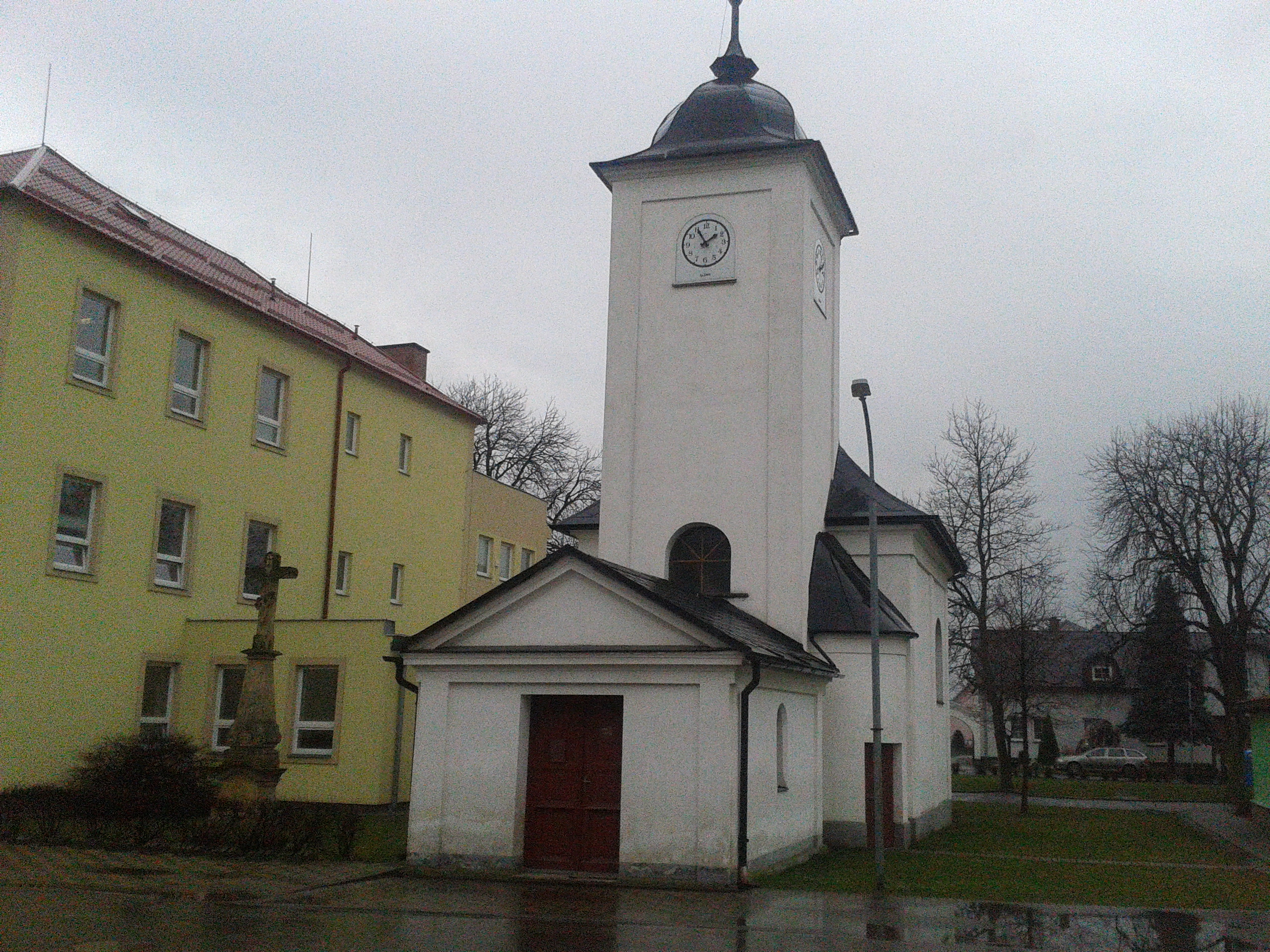 Leština kaplička